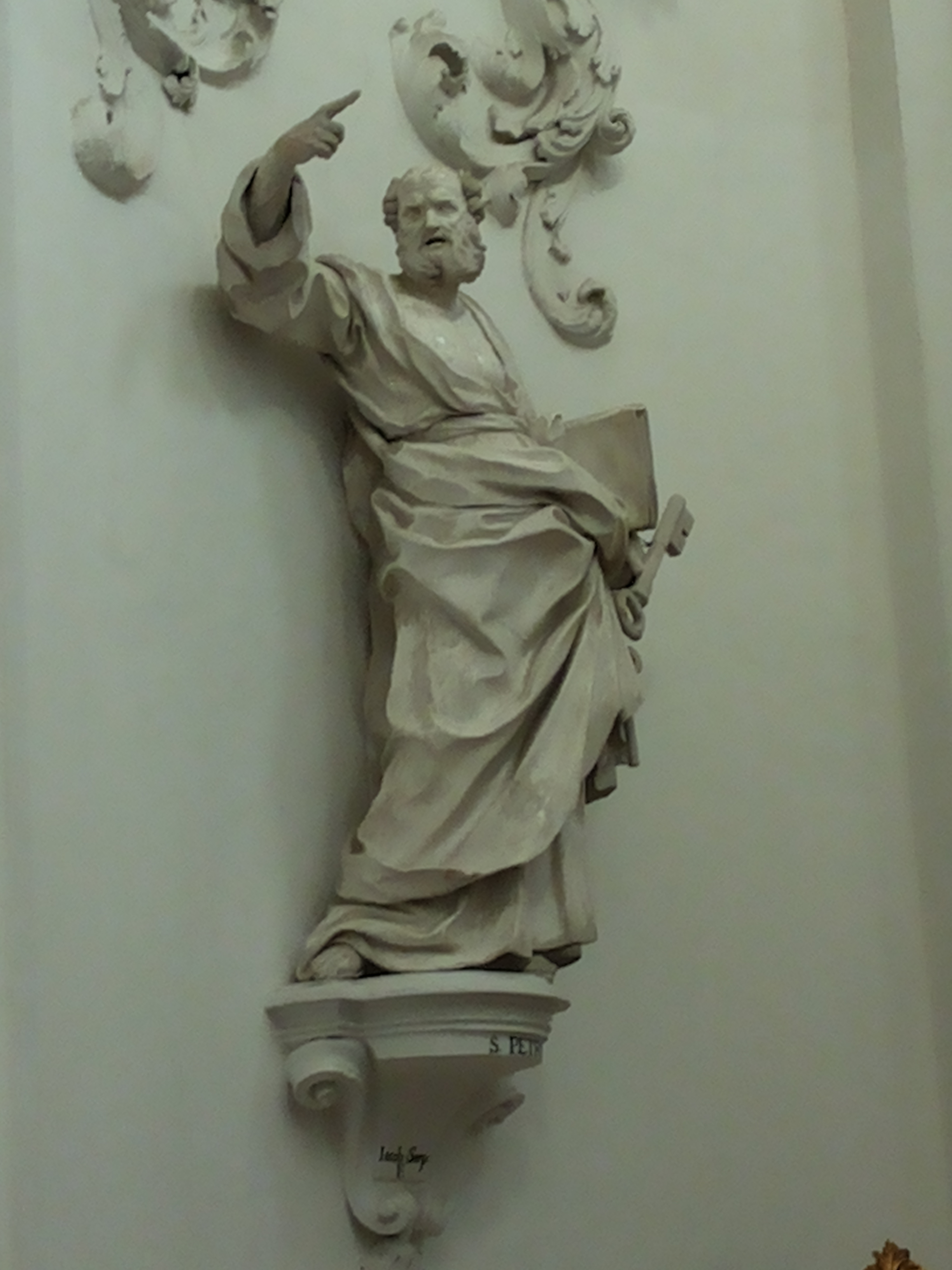 San Pietro di Giacomo Serpotta - Badia Nuova di Alcamo